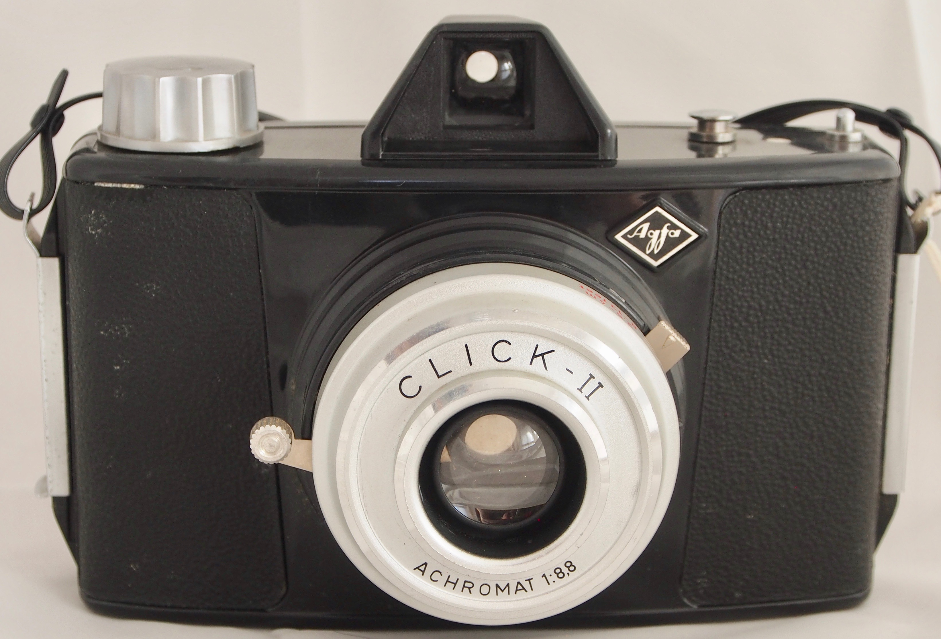 Click II Kadl# 1300V